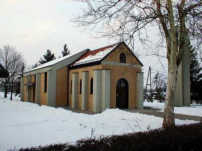 Lonjica - Crkva